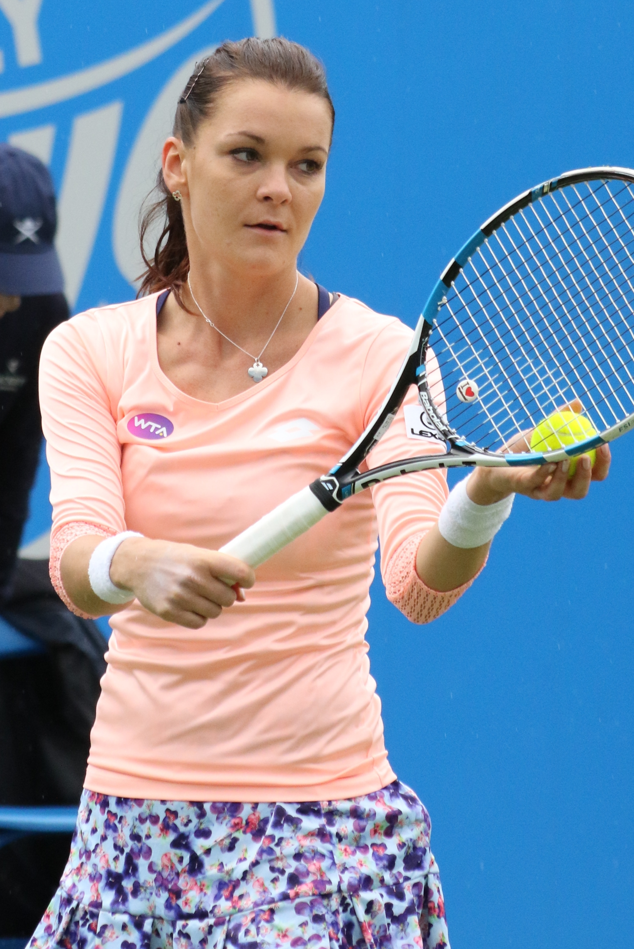 Radwanska A. BM16 (73)